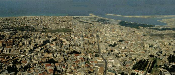 panorama della città di Gioia Tauro